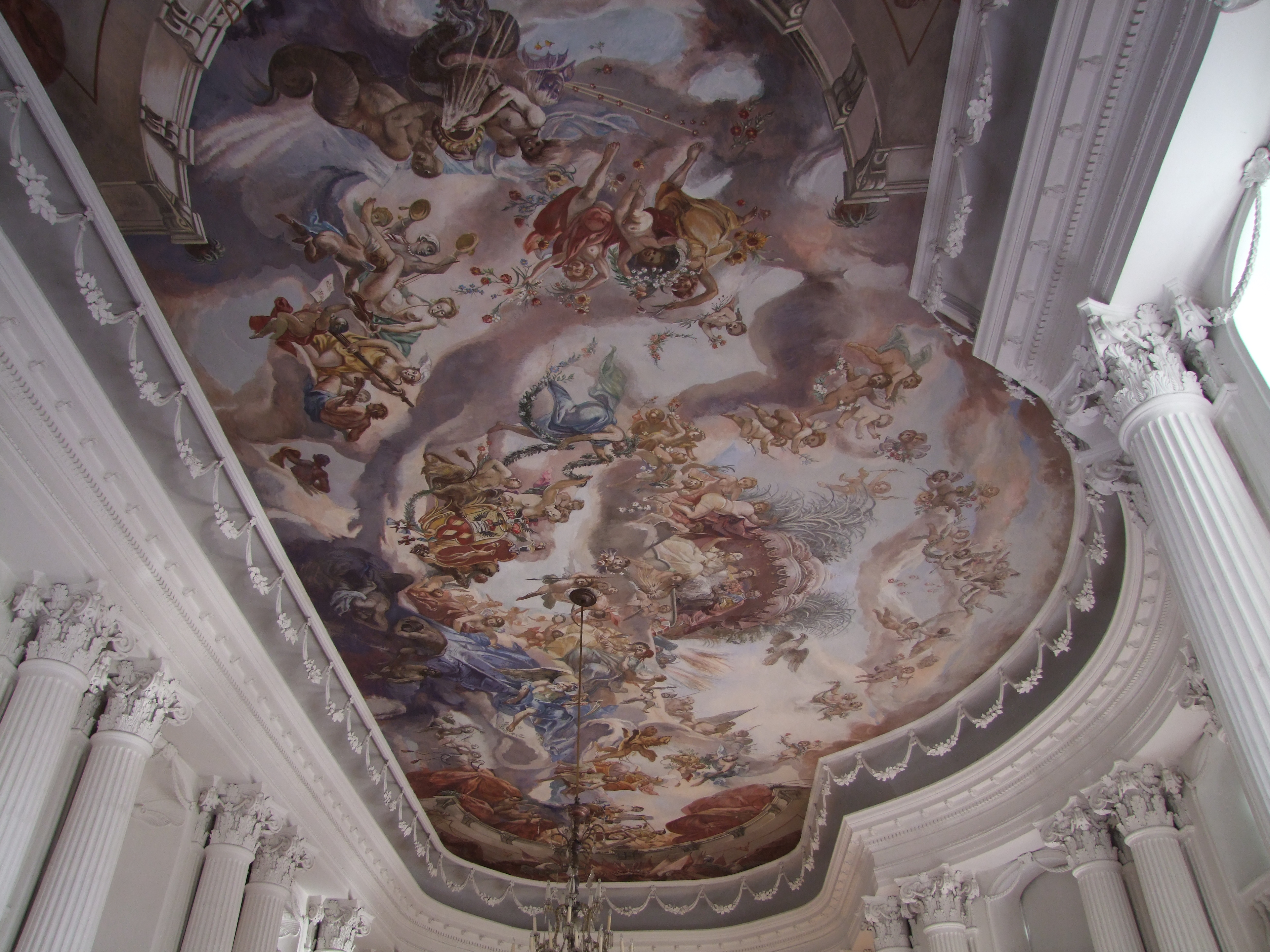 Rydzyna, ul. Zamkowa - zespół zamkowy z XVII-XVIII, XX w.: zamek (zabytek nr 52)